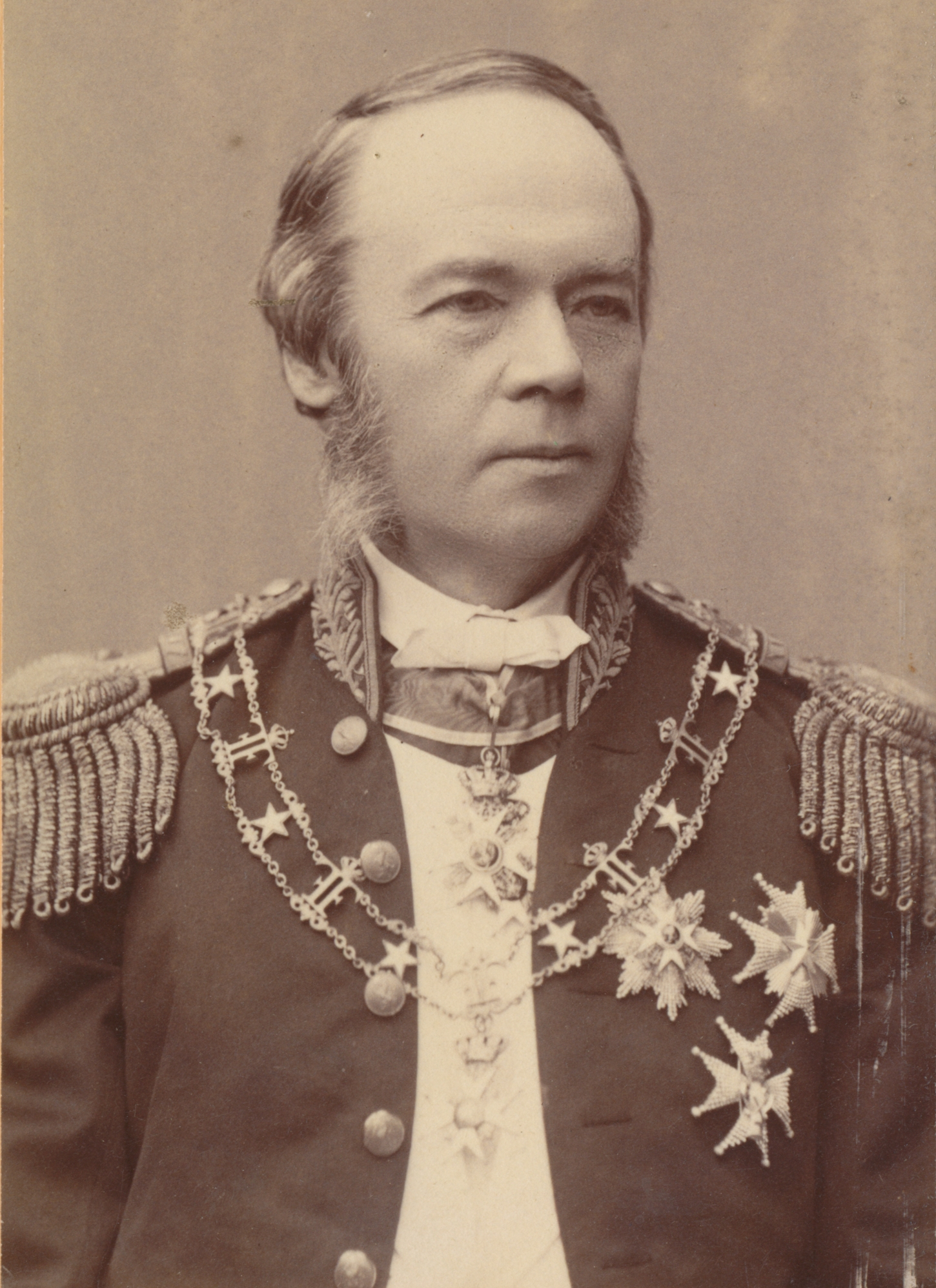 Ole Richter (f. 1829 på Inderøya, d. 1888 i Stockholm), jurist, norsk statsminister i Stockholm. Født og oppvokst på Rostad, Inderøya. Faren var fra Sundalen i Åsen. Se bl.a. Gurine Richters bok "Slægten Richter" (1910). Fotograf / Photographer: Selma Jacobsson, Fredsgatan 15, Stockholm Fotoeier / Photo owner: Marta Sannan Digitalisering / Digitizing: Arne Langås (2008) Foto-ID / Photo ID: 029-0025 Hvis bildet gjengis i andre sammenhenger, oppgi Åsen Museum og Historielag, fotoeier og fotograf som kildereferanse. Har du utfyllende opplysninger? Legg gjerne igjen en kommentar nedenfor eller send e-post til . | If you re-use this photo, please refer to Åsen Museum og Historielag, the photographer and the owner of the photo. Do you have additional information? Please leave a comment or send an e-mail to .